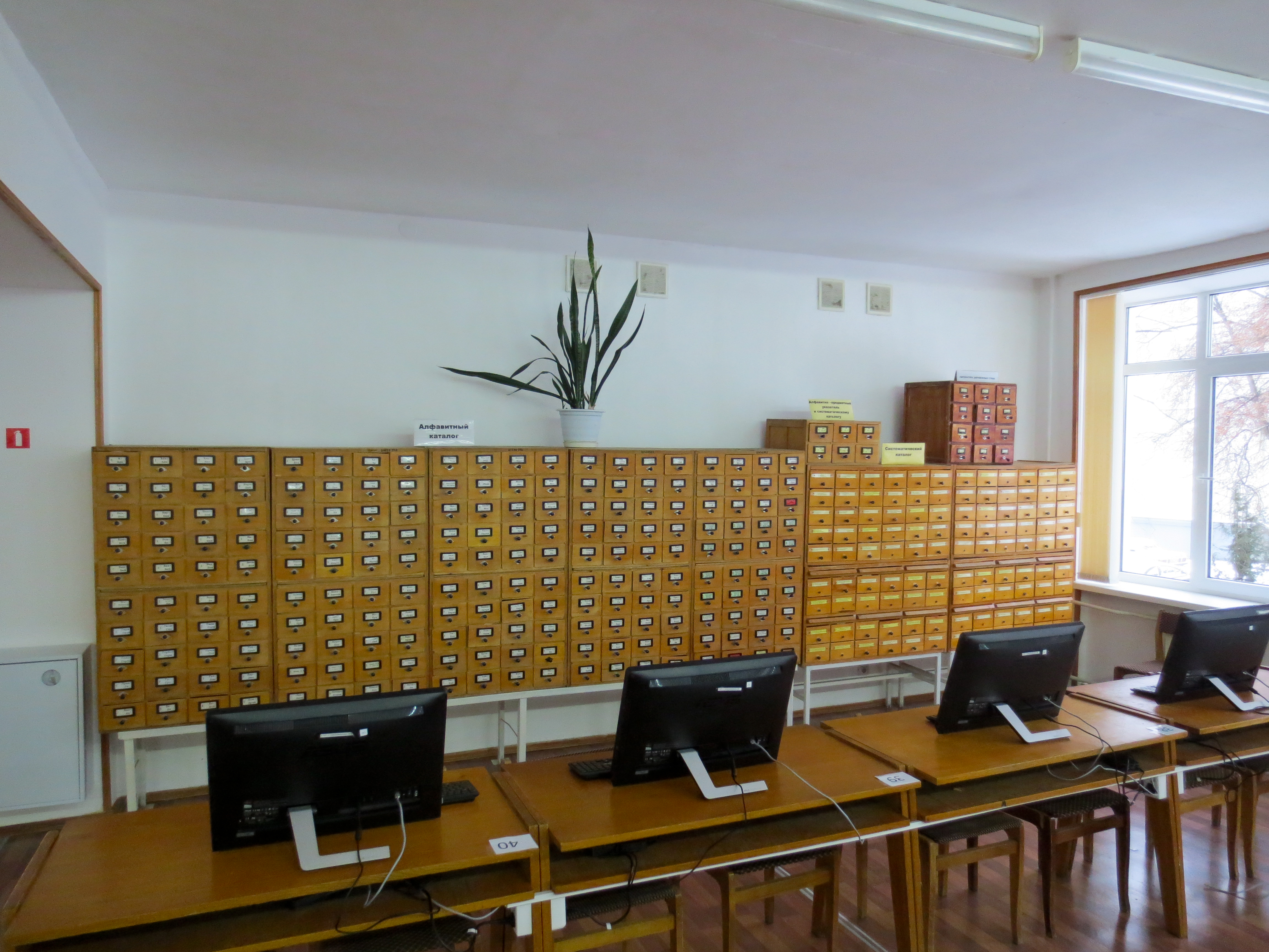 Генеральный, предметный и систематический библиотечные каталоги Научной библиотеки Курского государственного университета